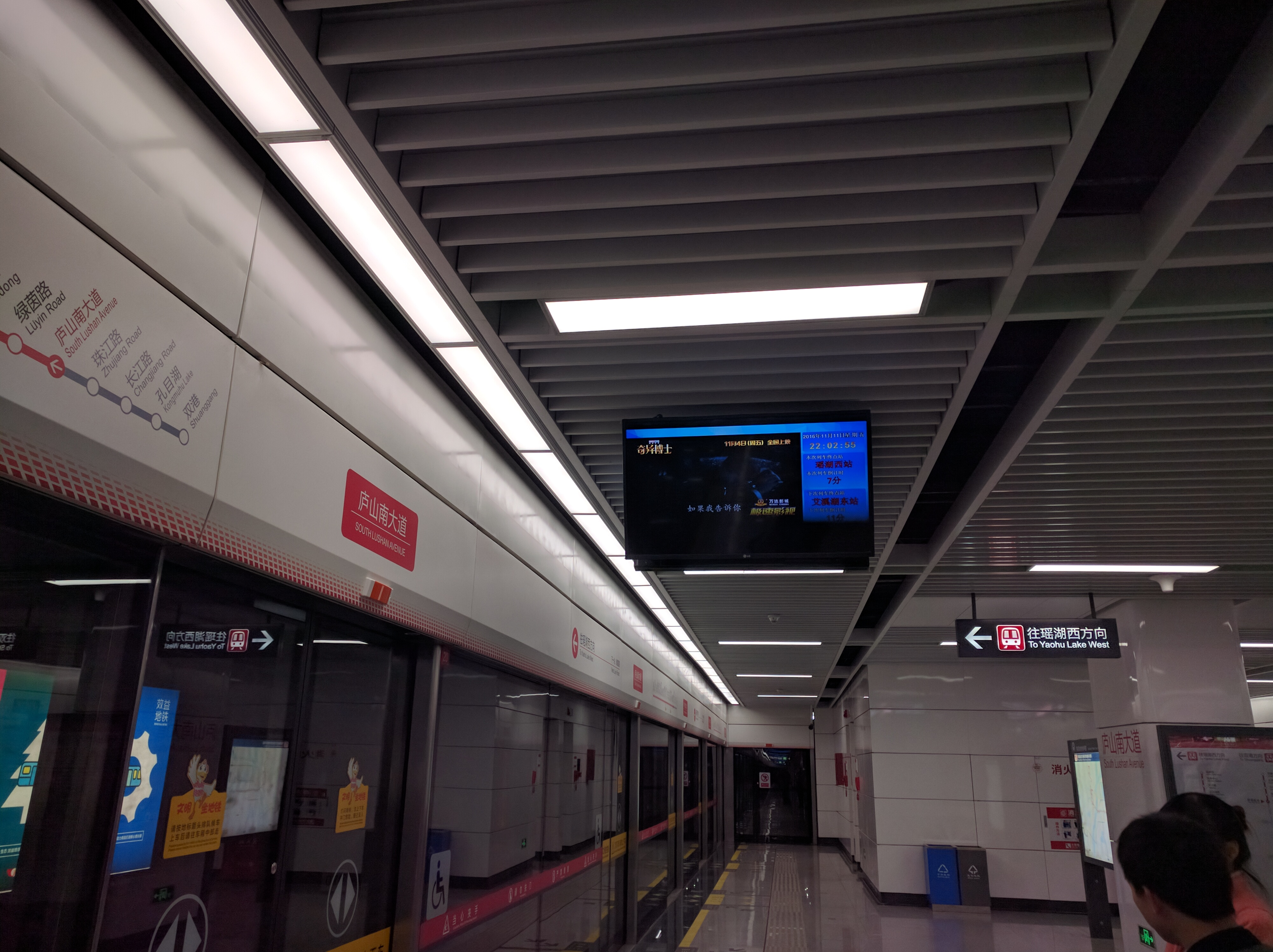 庐山南大道站站台